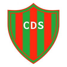 Deportivo Sarmiento